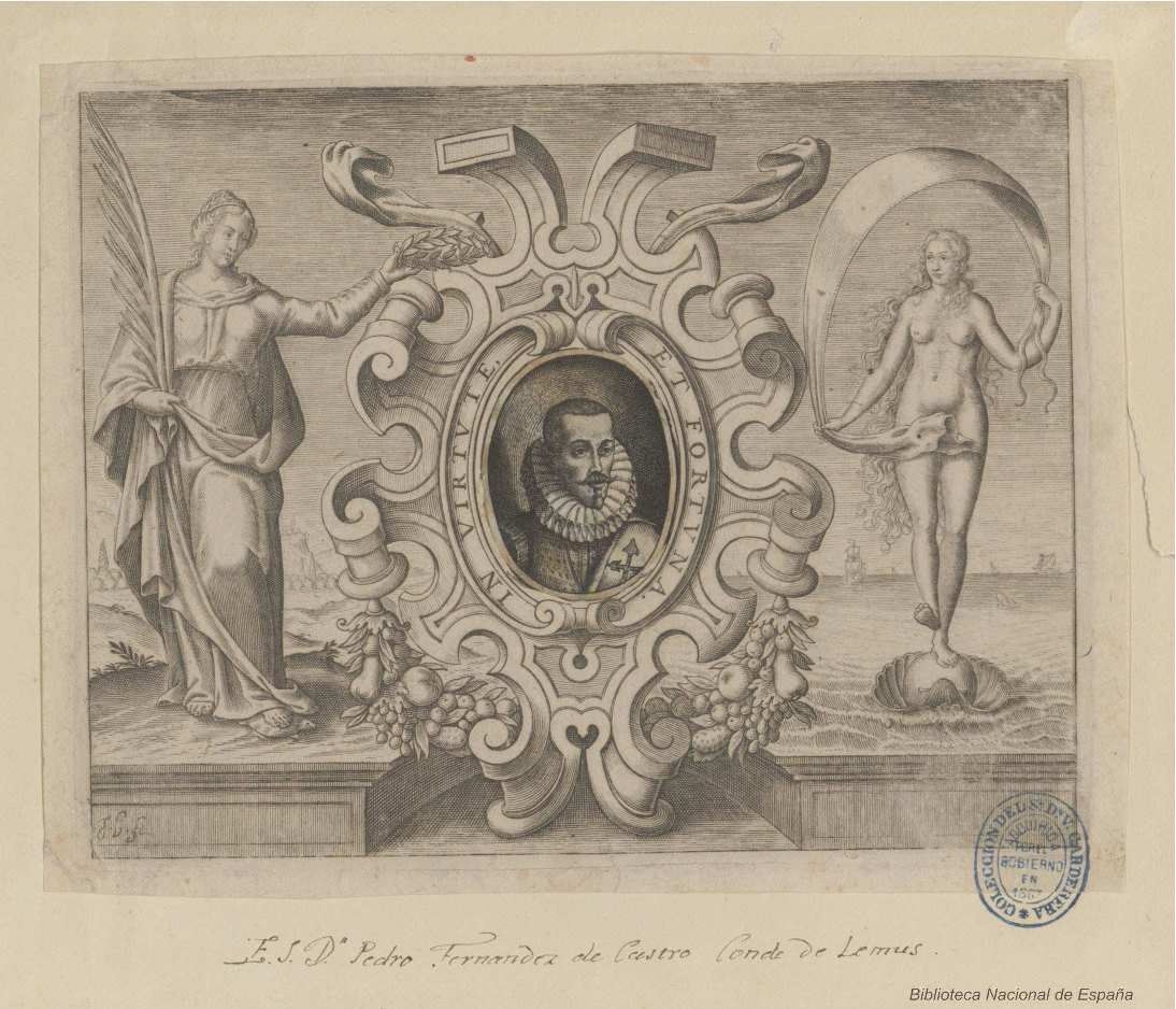 Pedro Fernández de Castro, conde de Lemos, grabado calcográfico. Retrato en marco oval recortado y pegado sobre un segundo grabado, firmado J.B. fe., anagrama no identificado. Biblioteca Nacional de España.